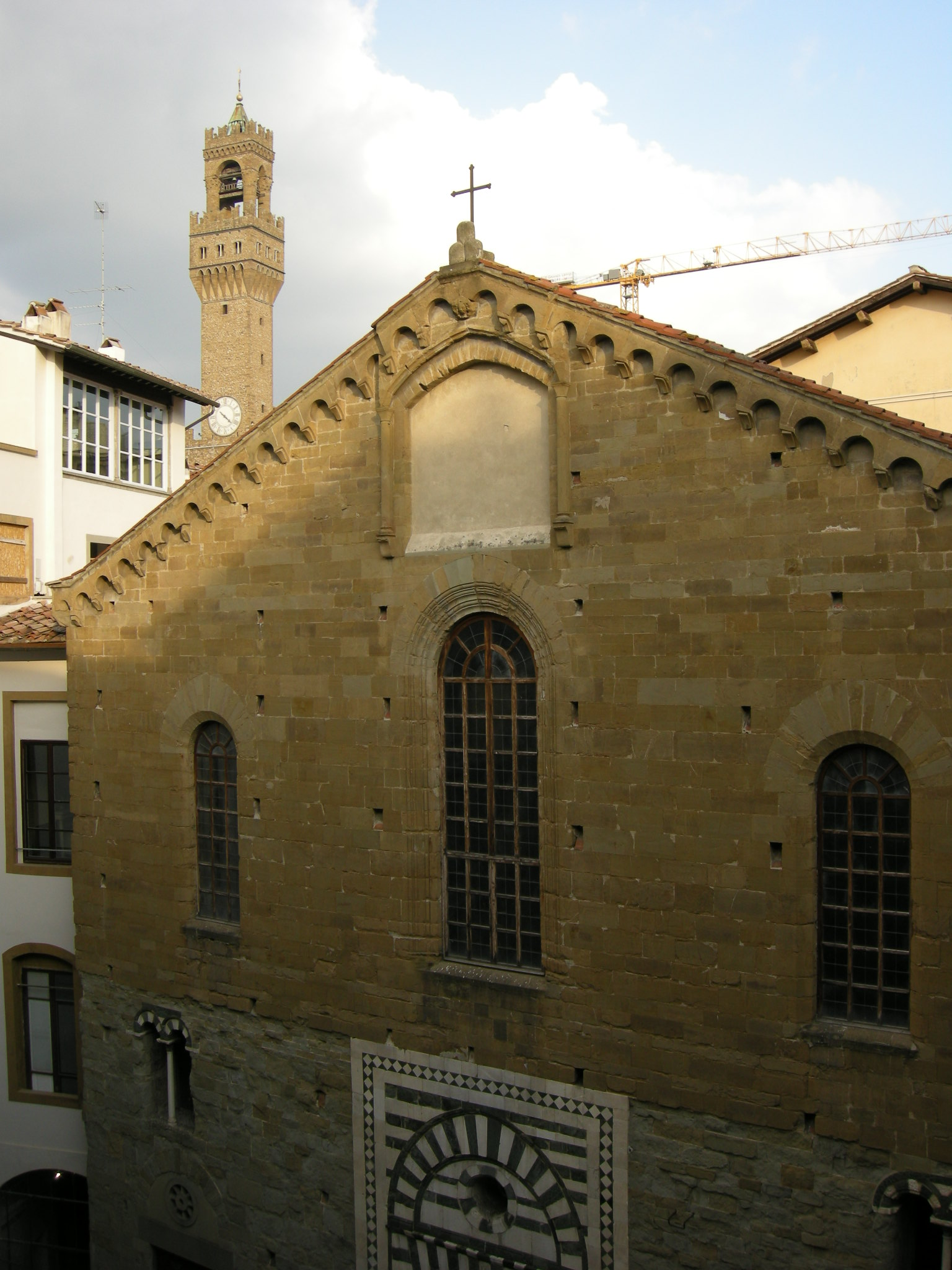 Santo stefano al ponte vecchio, facciata